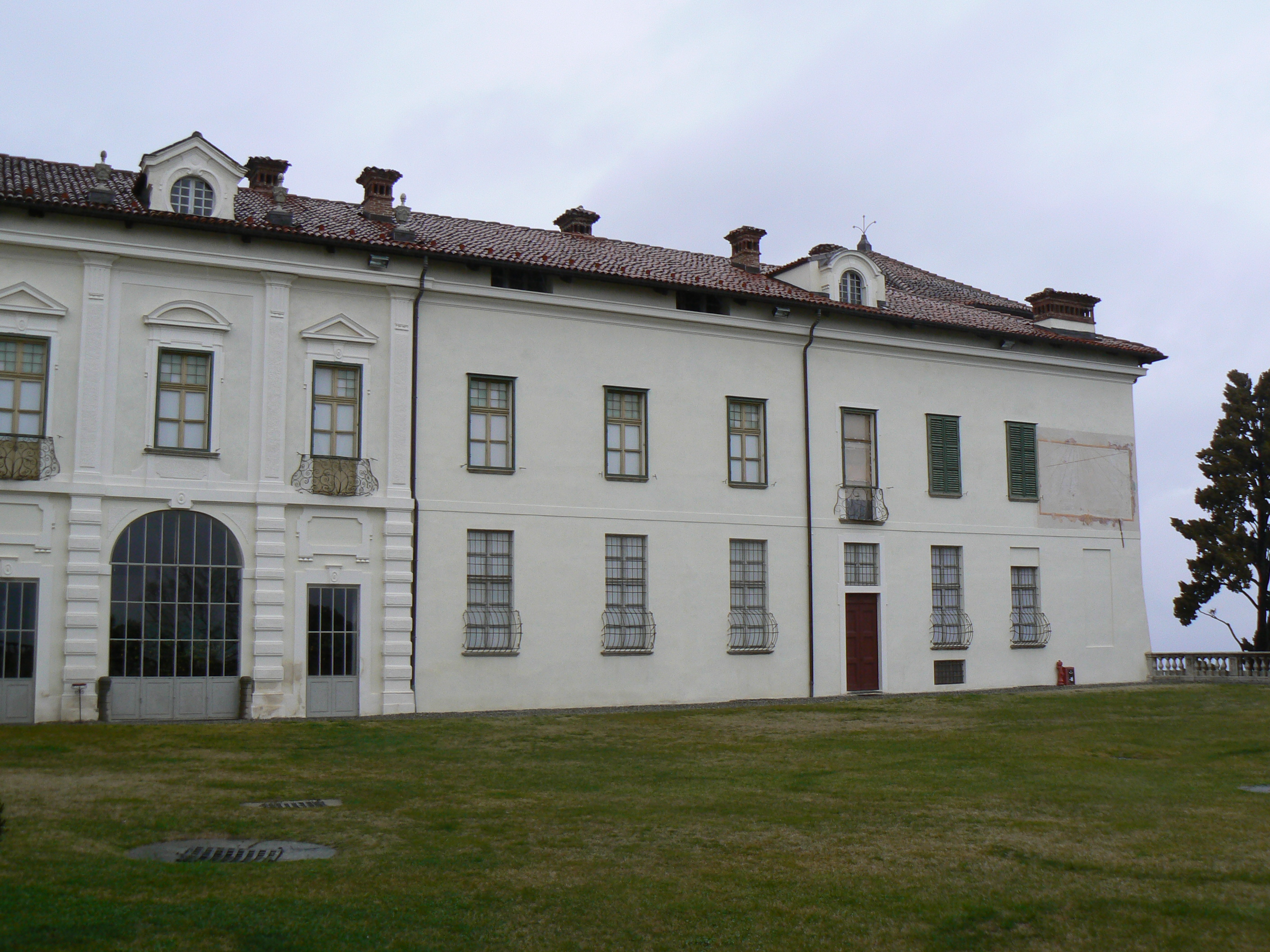 Giornata FAI al Castello di Masino, Piemonte, Italia.